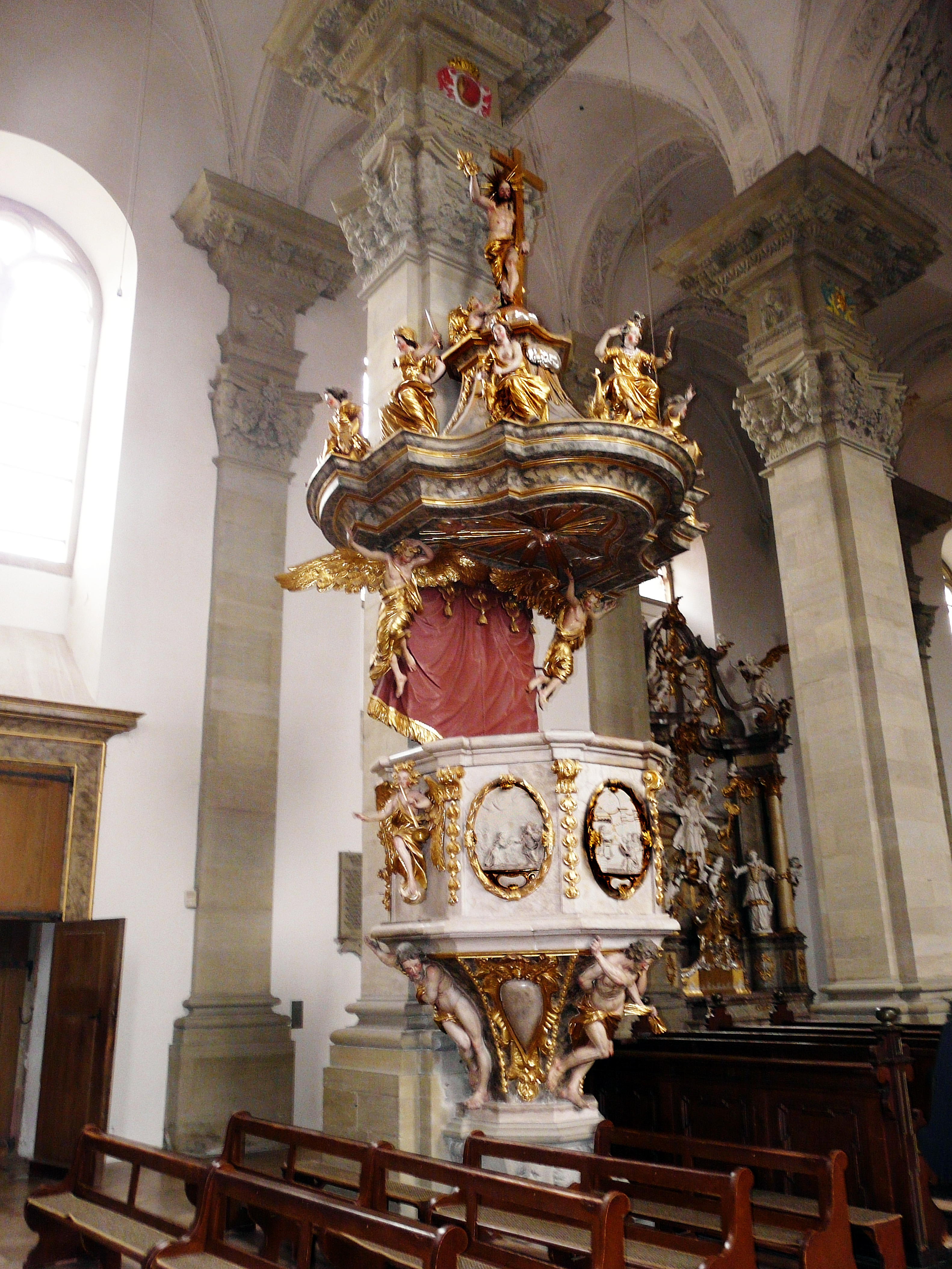 Кафедра семи смертных грехов